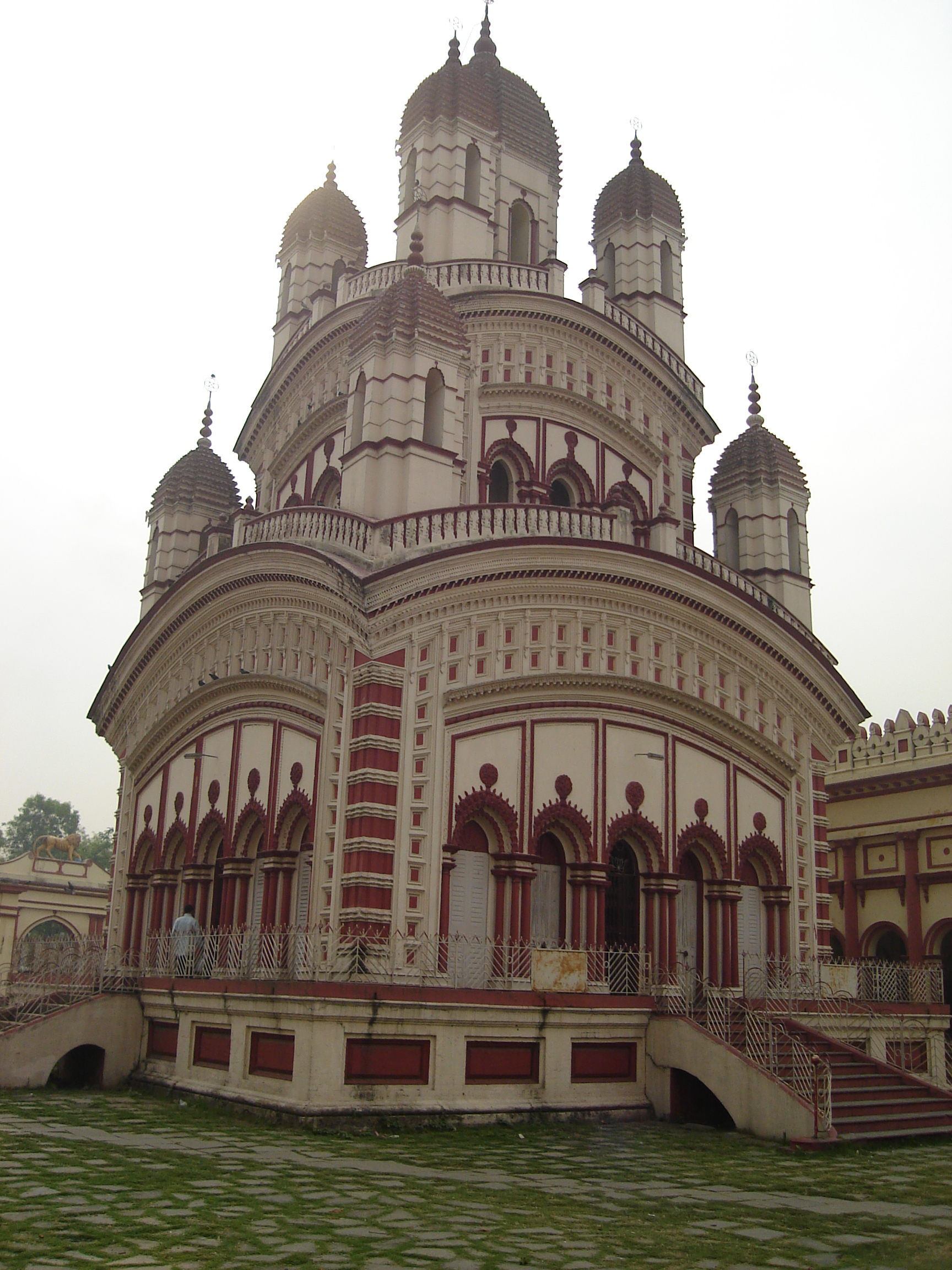 Annapurna Mandir, Titagarh, West Bengal